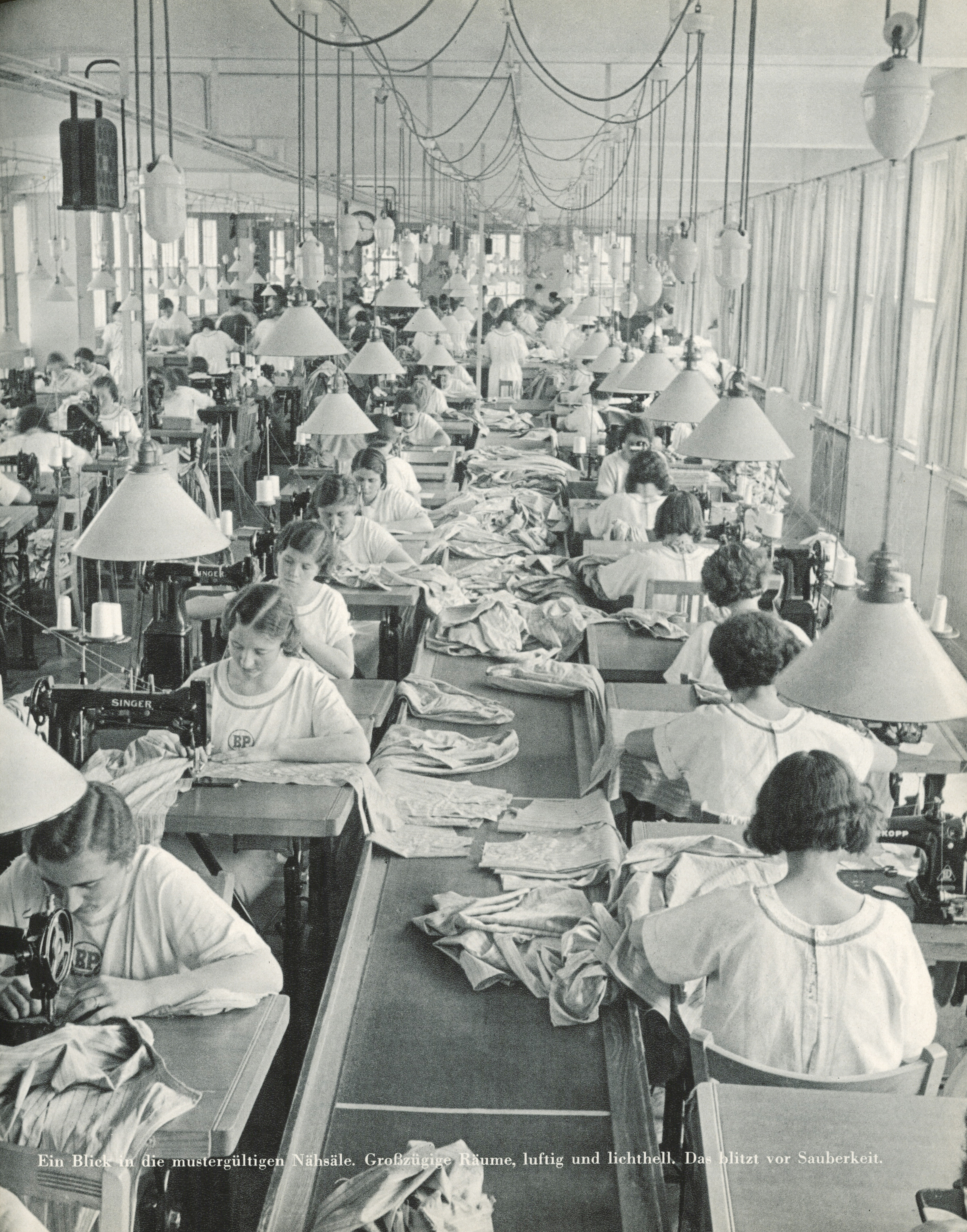 Fertigung im Jahr 1938 bei BP